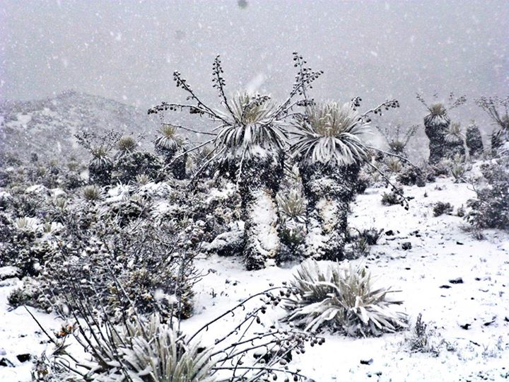 Frailejón cubierto de nieve en el páramo venezolano (Edo. Mérida)